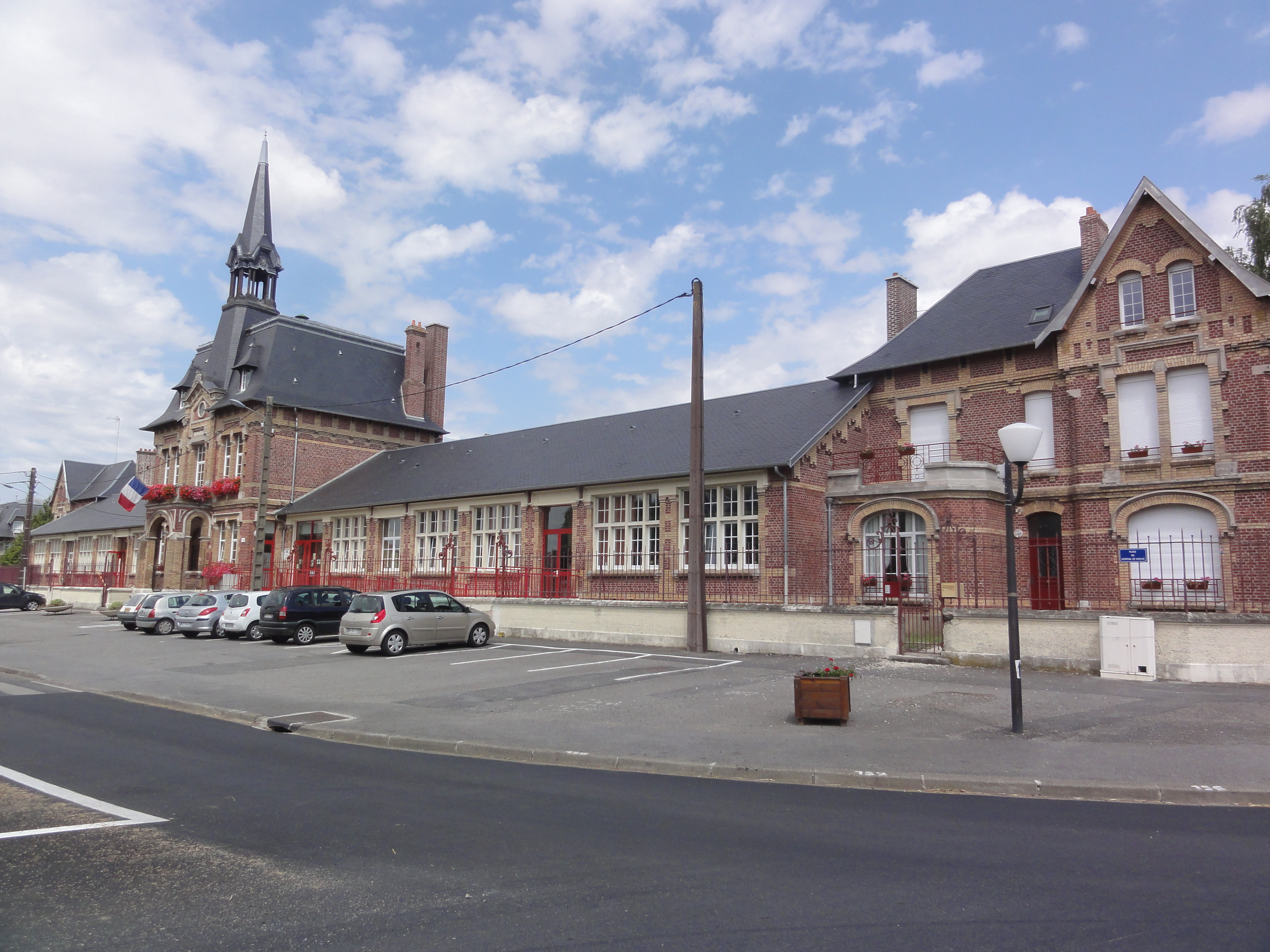 Flavy-le-Martel (Aisne) mairie et écoles du centre